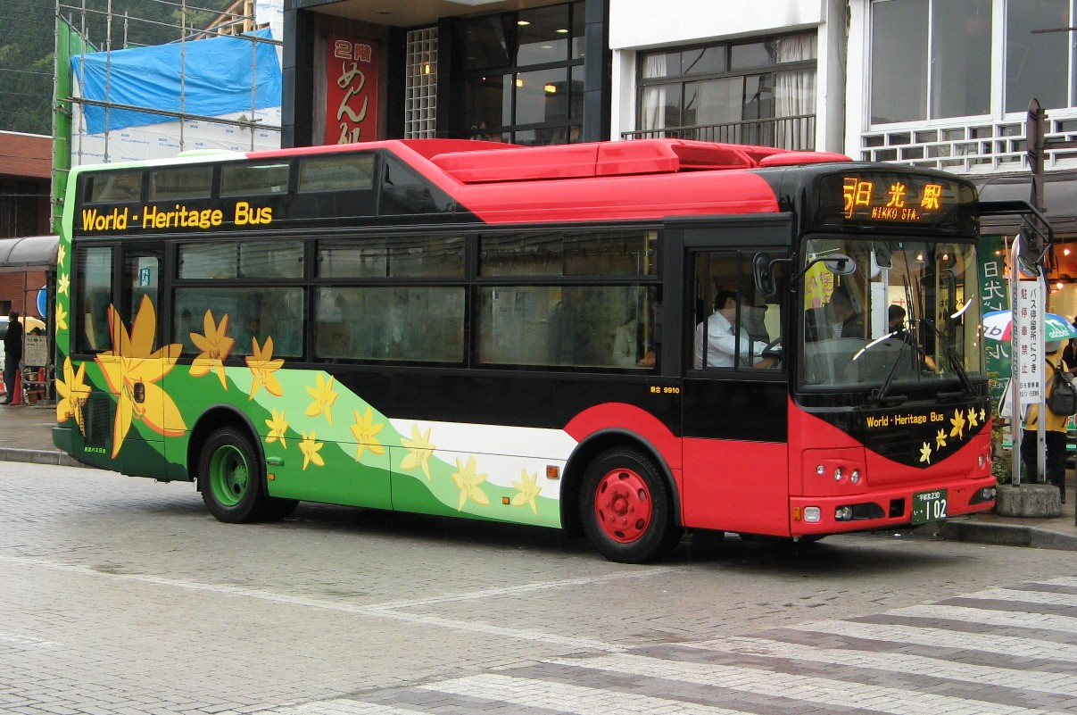 東武バス日光9910号車。世界遺産めぐり循環バス専用車両。2008年3月20日よりこの車両も使用開始となった。